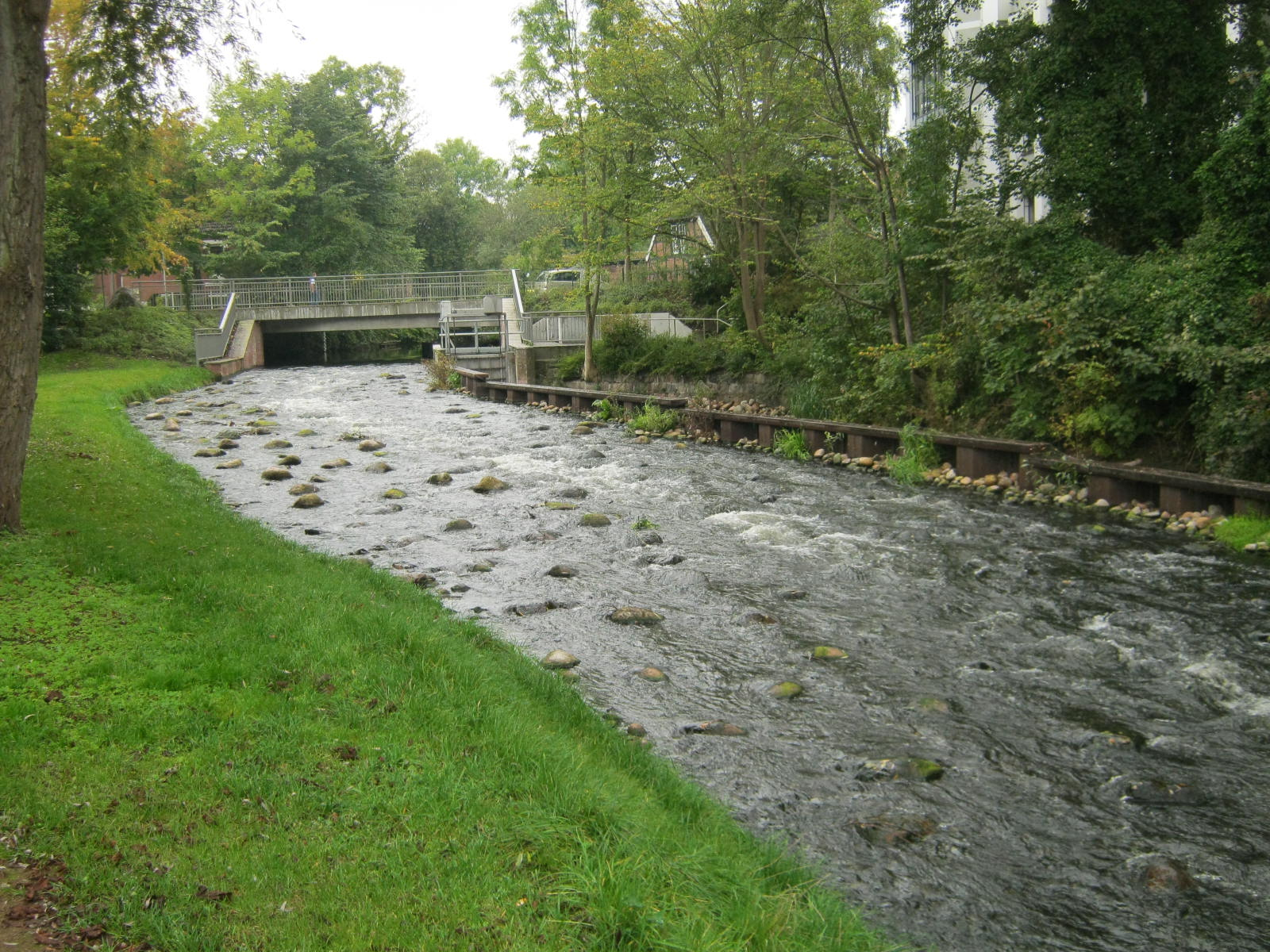 Alte Schwentine (auch Mühlenau oder Postau genannt) in Preetz nach Renovierung der Klosterstraßenbrücke.